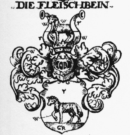 Stammwappen der Frankfurter Patrizierfamilie Fleischbein